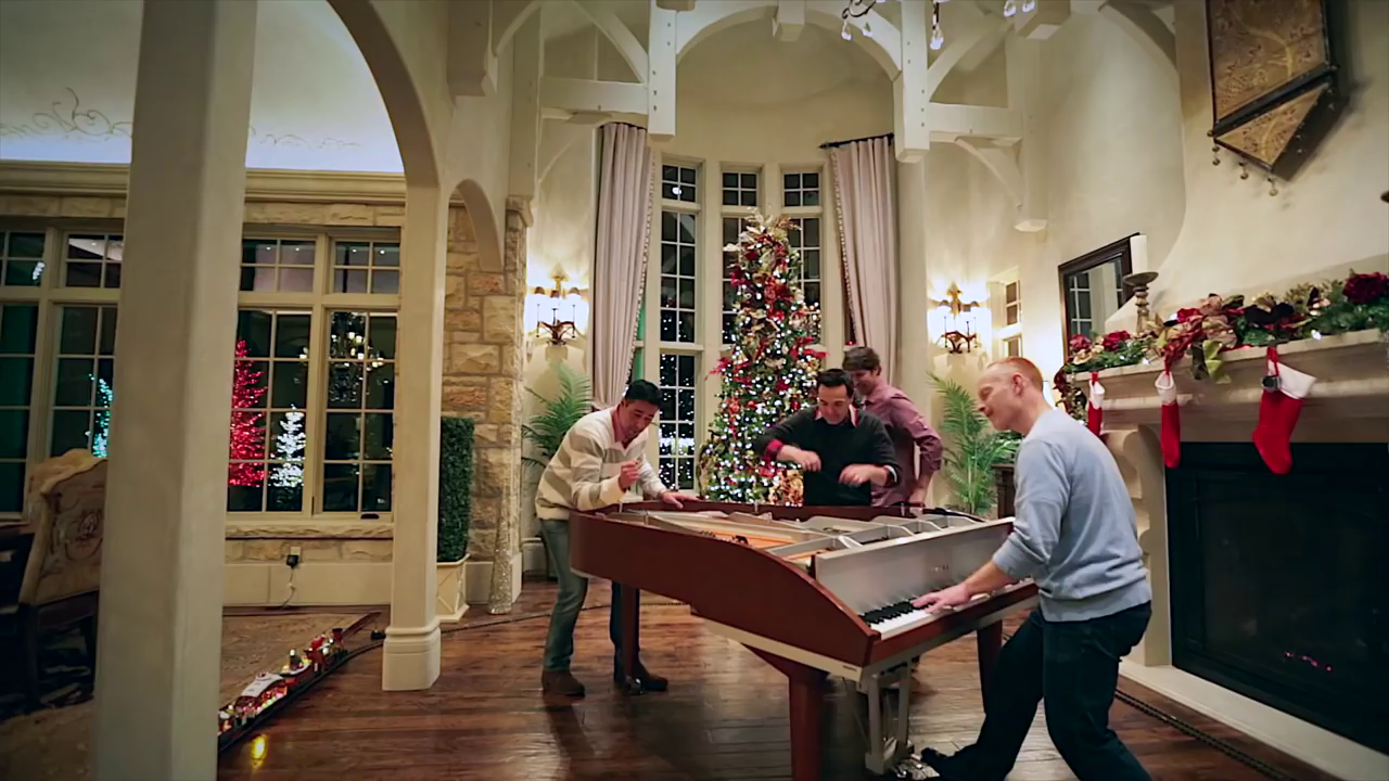 The Piano Guys đang trình diễn bản Angels We Have Heard on High.